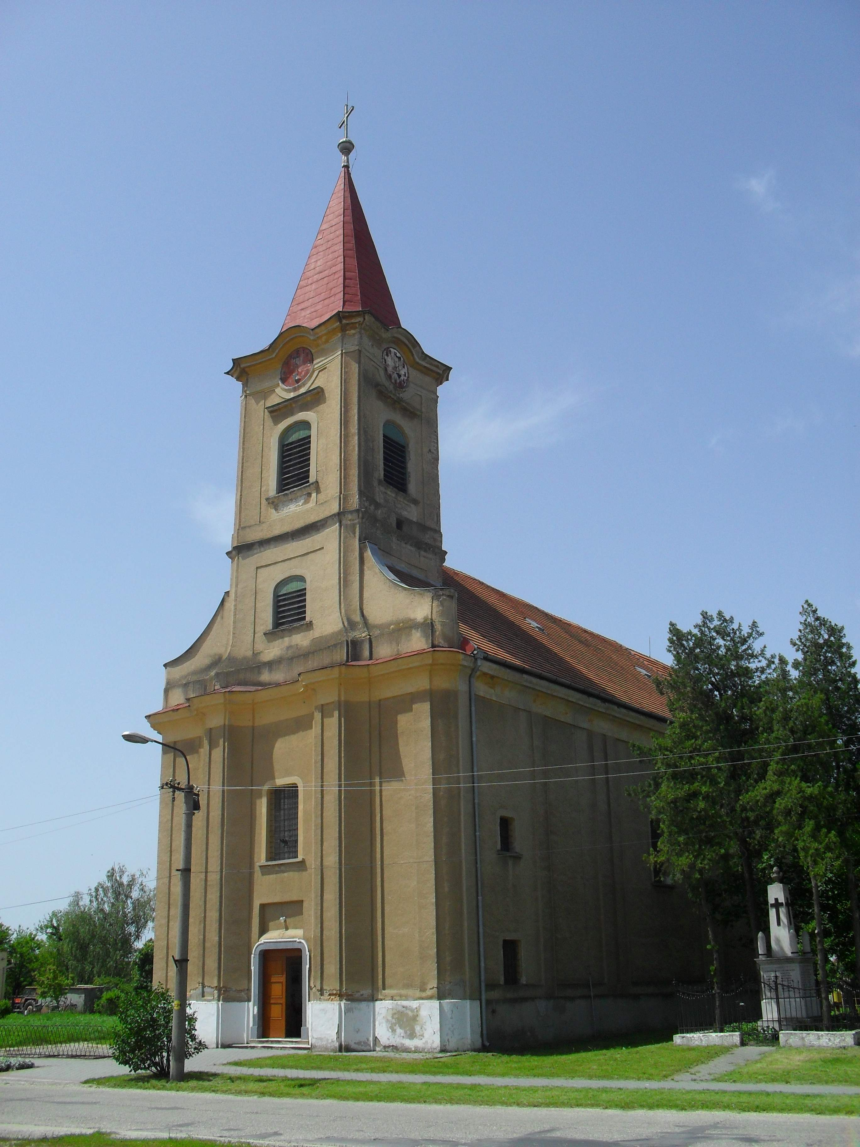 Izsa - katolikus templom